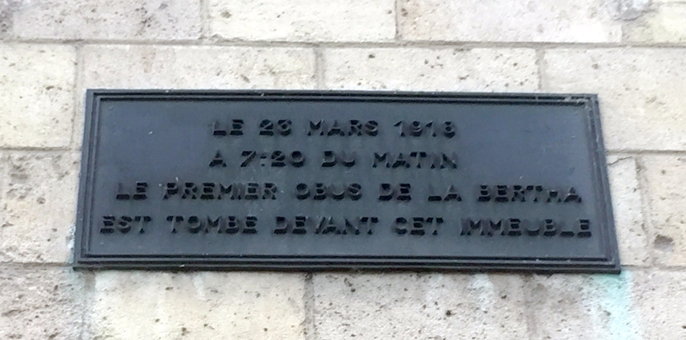 Plaque rappelant le tir d'obus à longue portée d'une Pariser Kanone sur Paris, le 23 mars 1918, plaque apposée sur la façade latérale de la Maison des canaux, 6 Quai de Seine, XIXe arrondissement, Paris, France. This image was uploaded as part of L'Été des villes 2015.